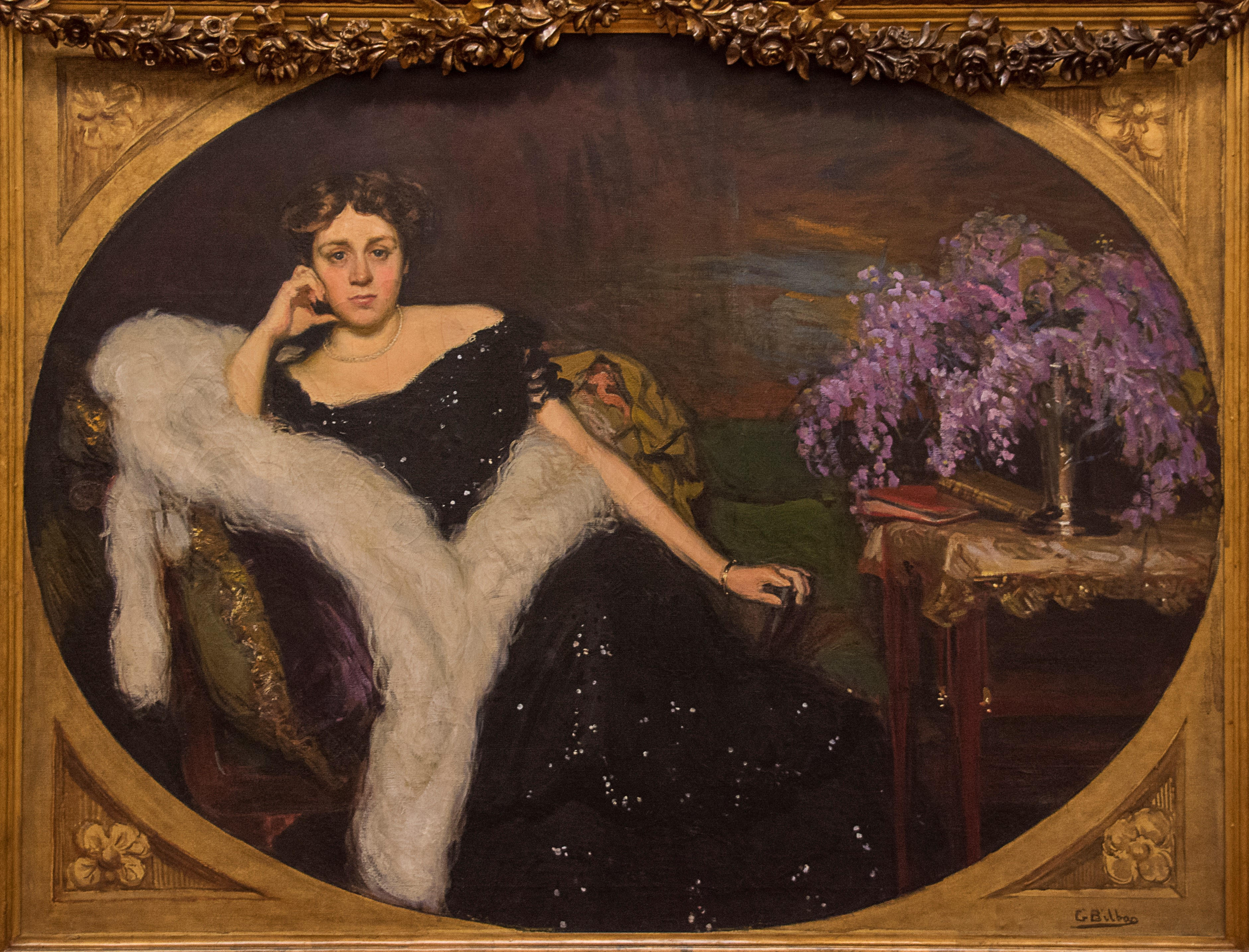 Retrato de María Roy (1890). Autor: Gonzalo Bilbao. Museo de Bellas Artes de Sevilla.